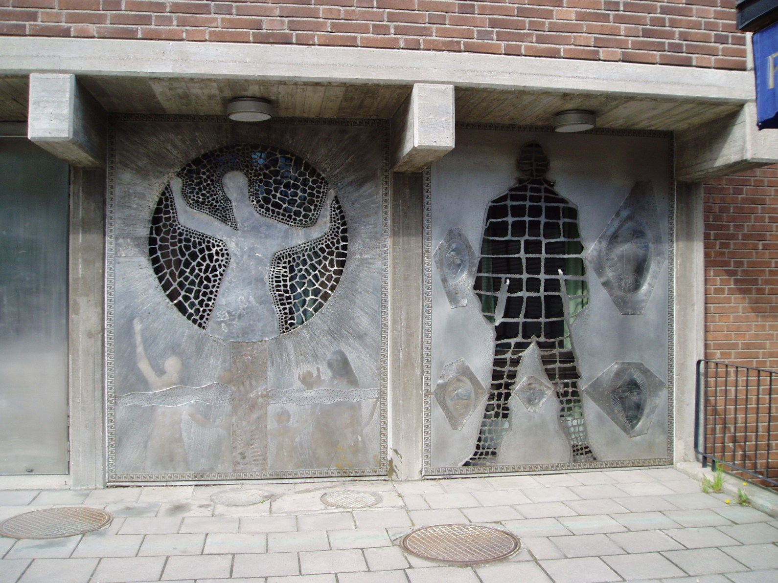 konst vid Jakobsbergskyrkan, art at Jakobsbergskyrkan, Järfälla, Sweden